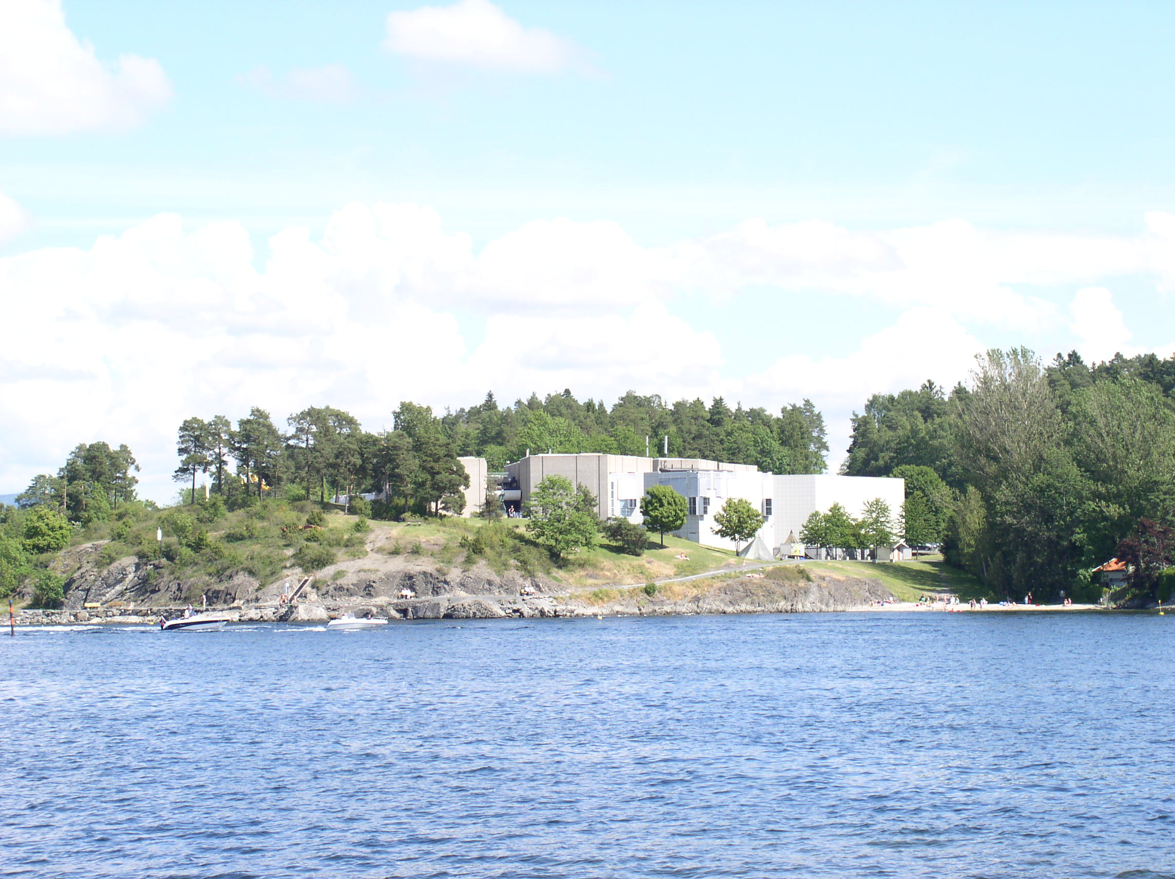 Henie Onstad Kunstsenter sett fra Kalvøya